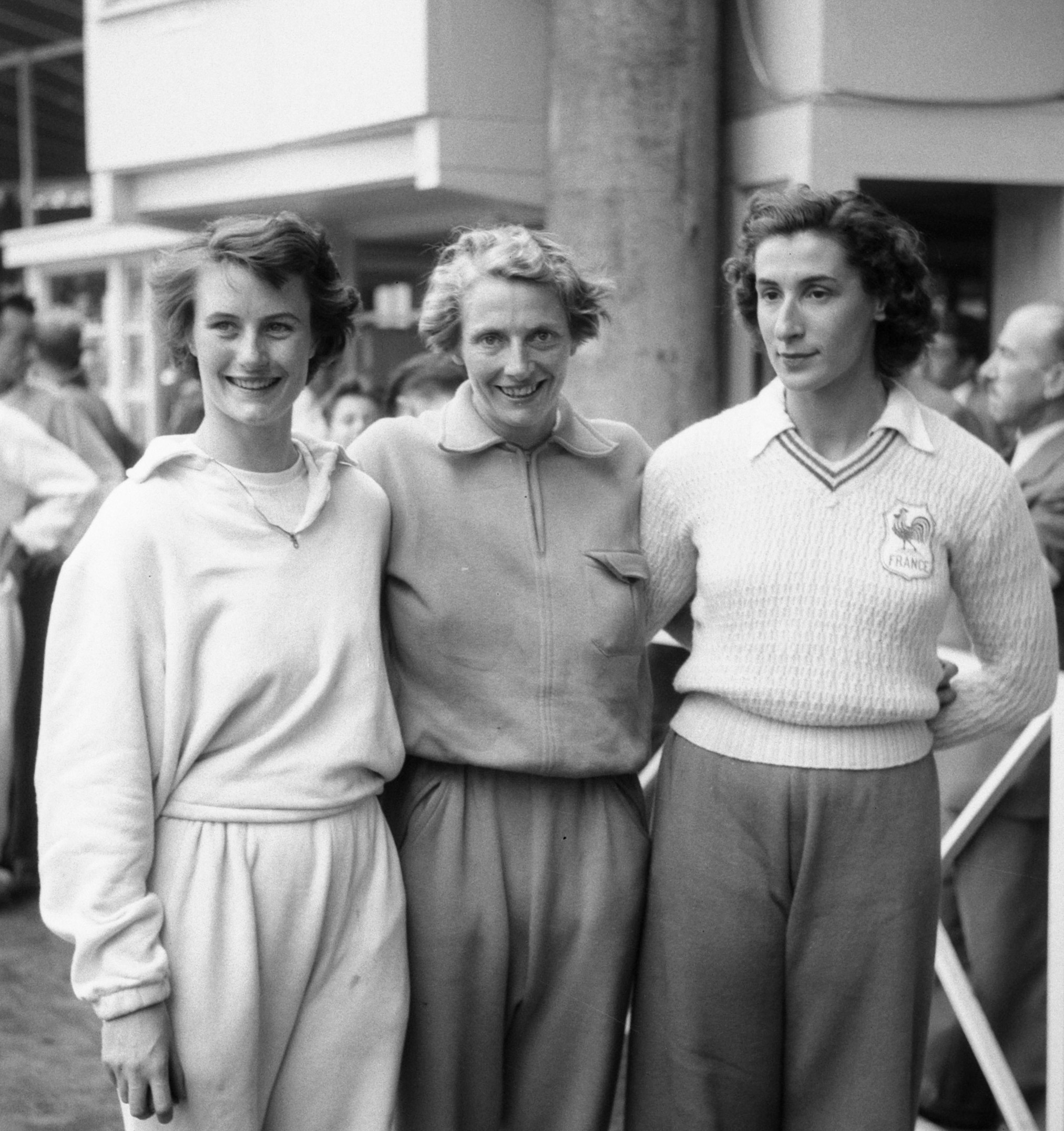 Europese atletiekkampioenschappen te Brussel; Fanny Blankers-Koen (midden), Gardner en Ostermeyer